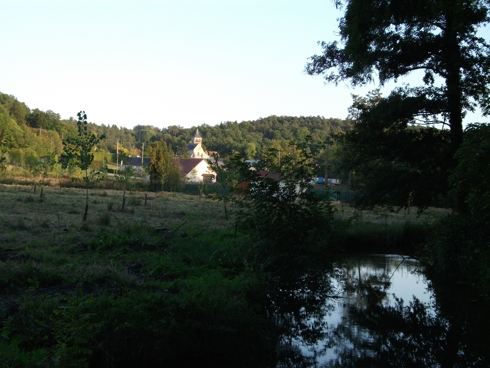 village Boissy la rivière, vue depuis le fond du vallon.